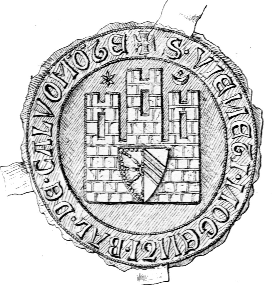 de la ville de Chaumont.